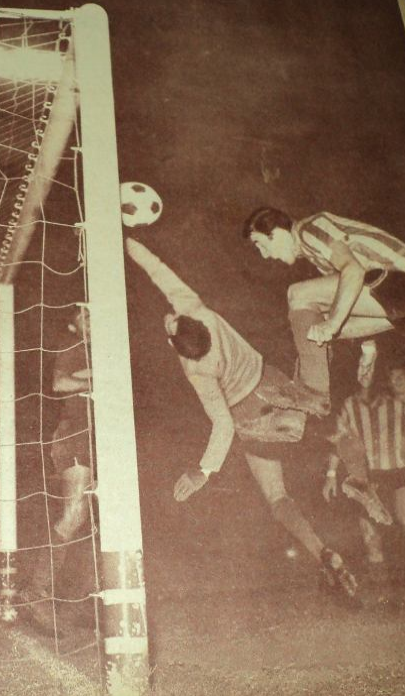 Partido del 3 de noviembre de 1968, Rosario Central 0-Boca Juniors 0. El arquero de Boca Rubén Omar Sánchez tapa un cabezazo de Adolfo Bielli.